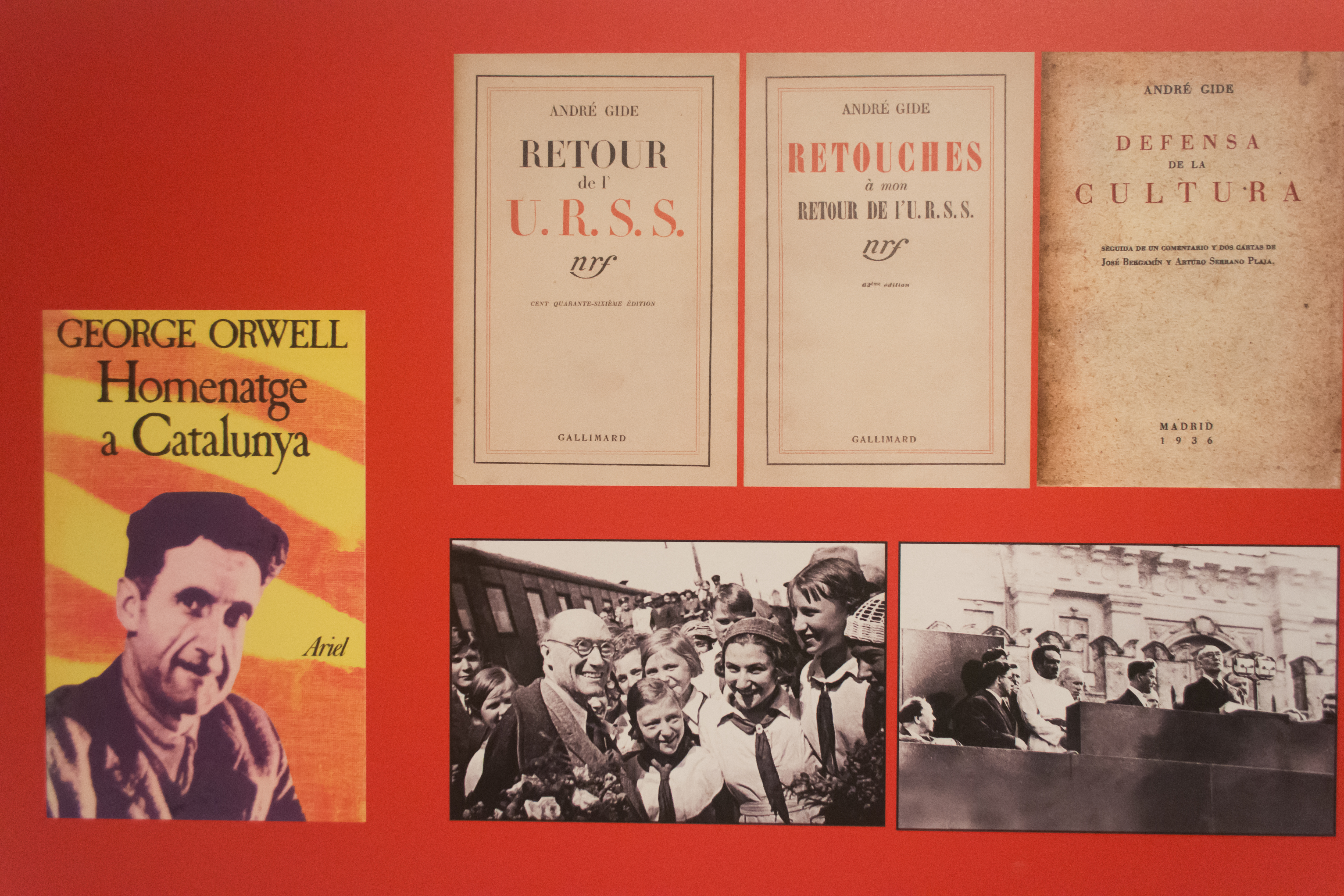 Escritores ausentes en el Segundo Congreso Internacional de Escritores para la Defensa de la Cultura. Exposición Por la defensa de la Cultura en el Centro del Carmen de Valencia.